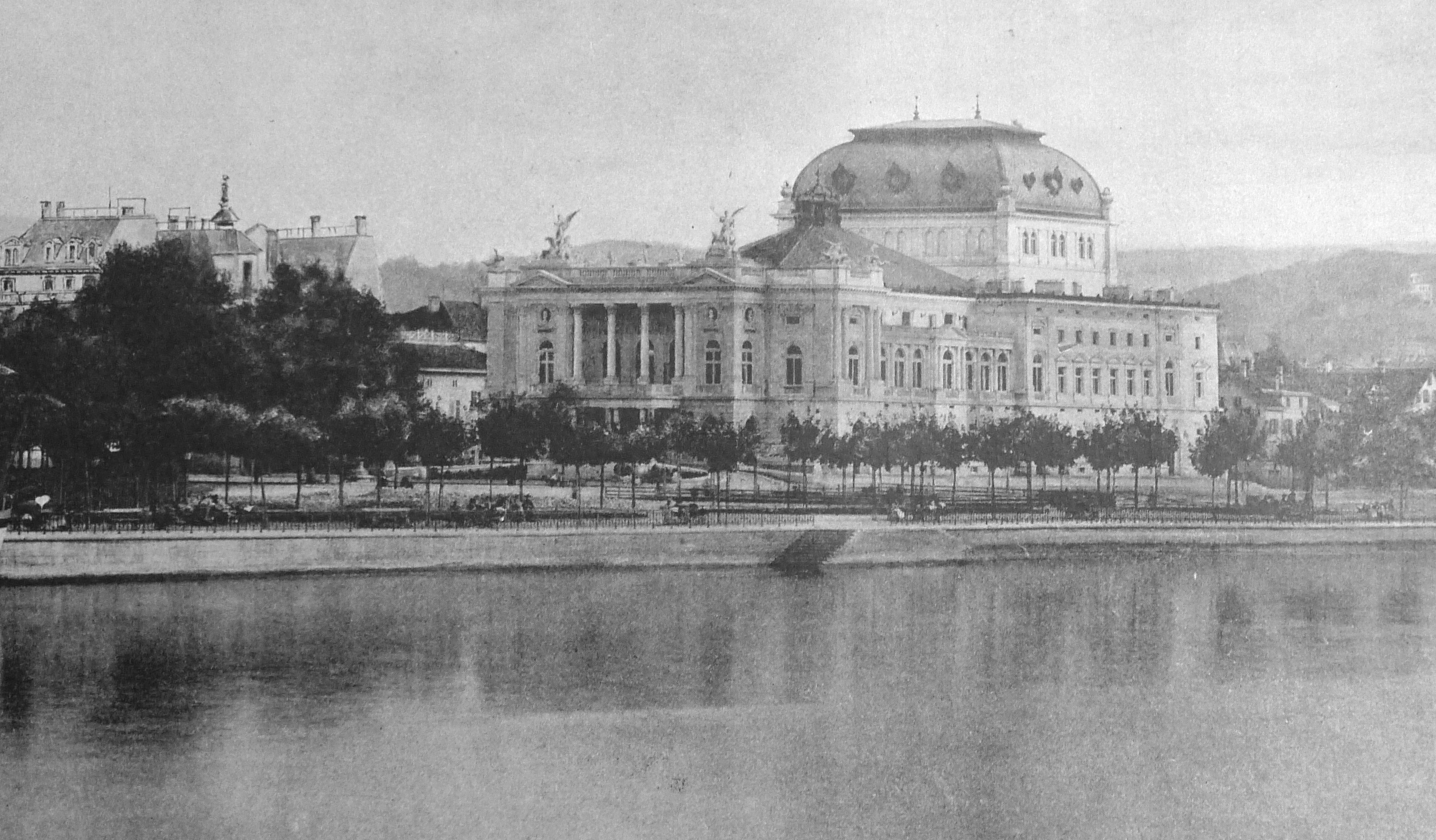 Opernhaus Zürich nach der Eröffnung um 1893